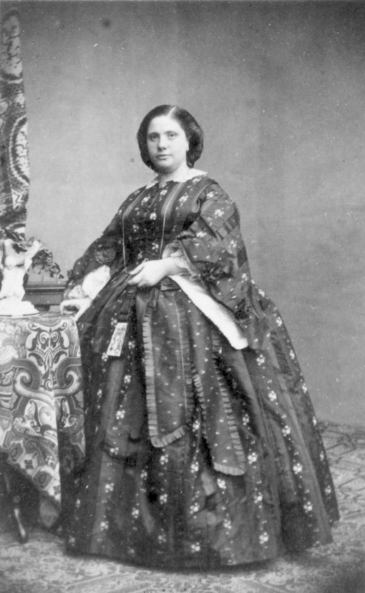 Infanta Amalia de Borbón, Prinzessin von Bayern.